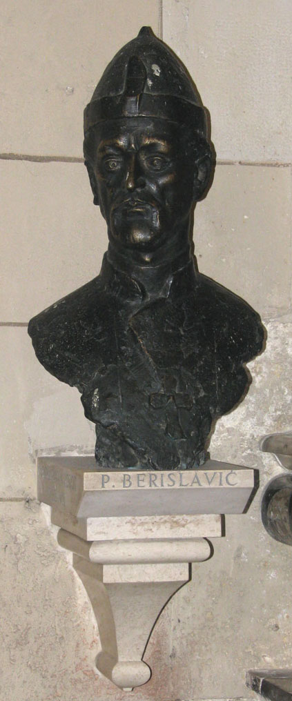 Petar Berislavić